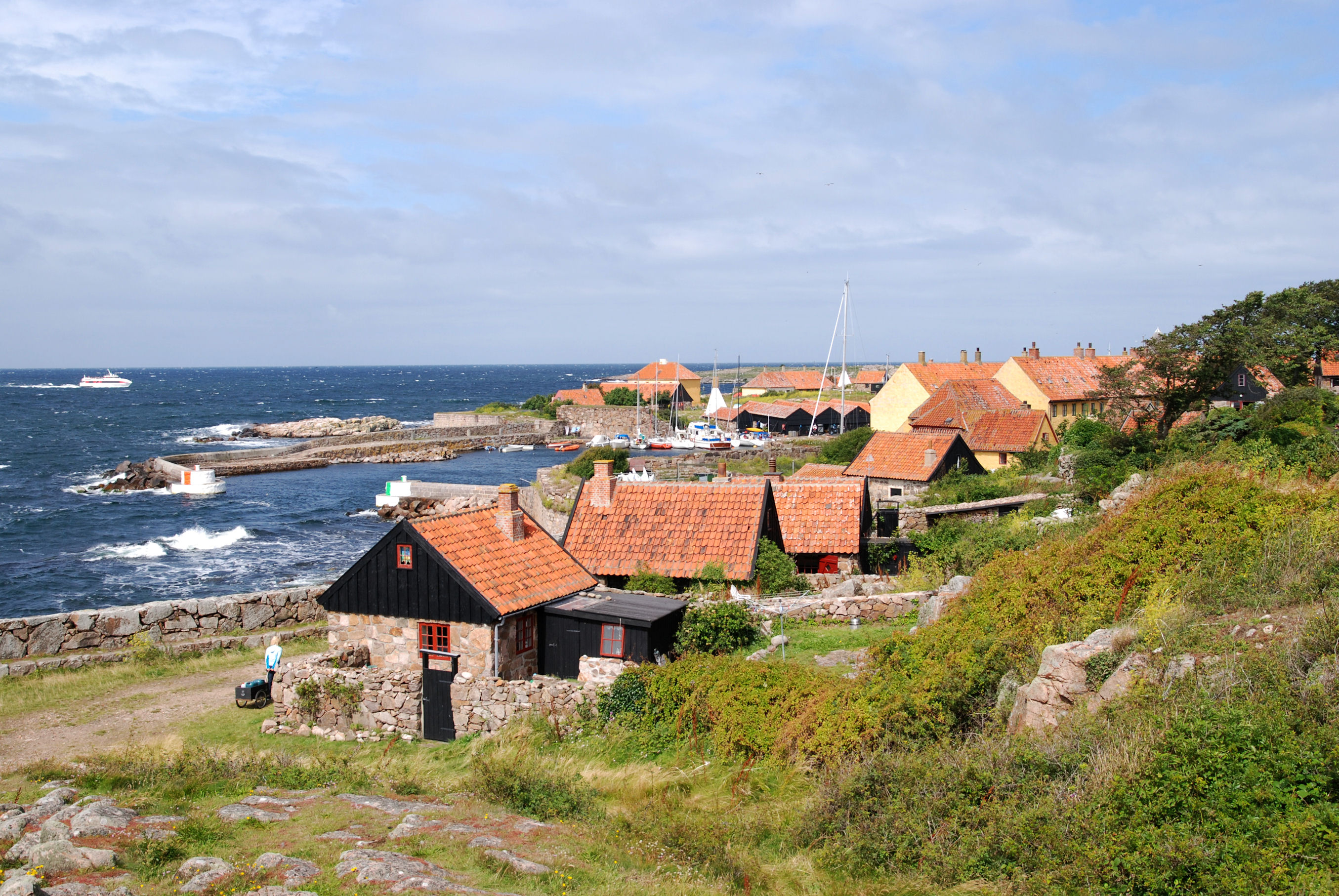 Wybrzeże Christianso